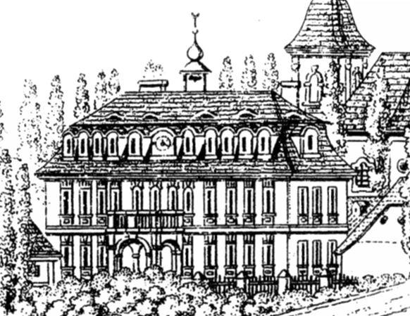 Zámek Zdiby, rytina dle kresby F. K. Wolfa z r. 1815